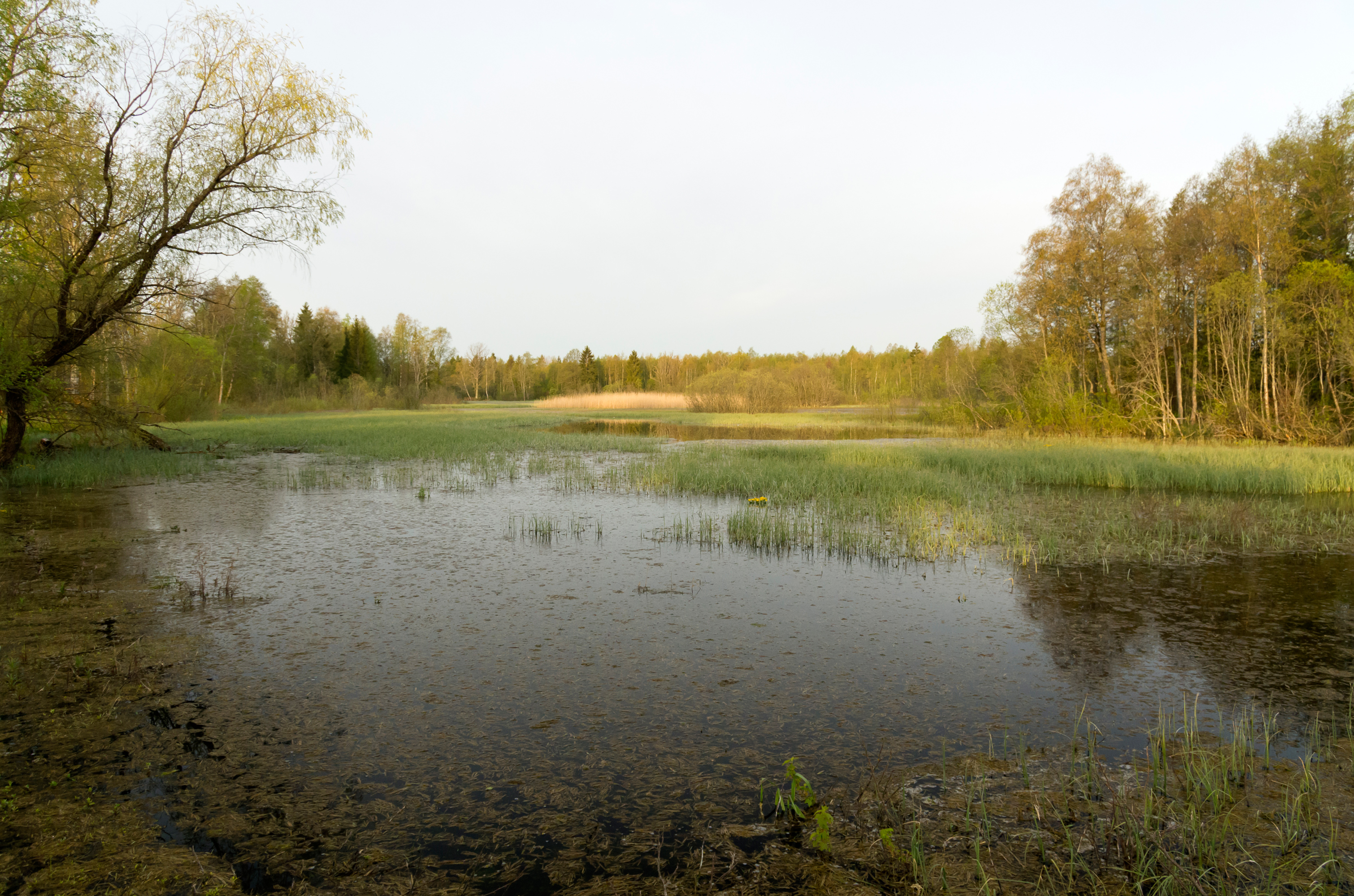 Esna allikajärv, vaade piimaköögi tagant